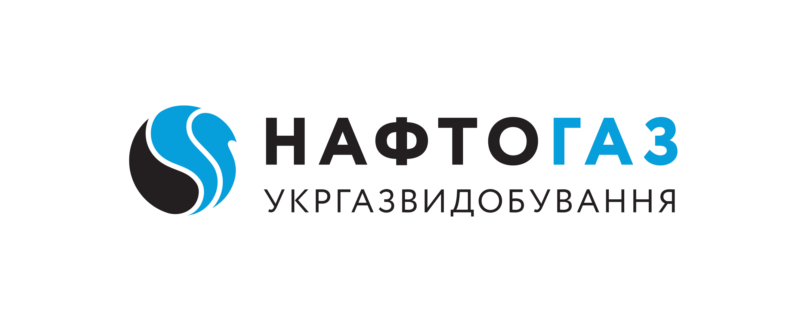 Логотип АТ "Укргазвидобування"